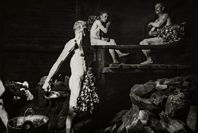 1900 -luvun alku . Helsinkiläinen sauna. Ihmisiä kylpemässä. Kuvan takana teksti: Vanhassa helsinkiläissaunassa, jossa on kivikumpu kiukaana ja saavi, josta kuupalla heitetään vettä kuumille kiville. Koivuvihdat ovat täälläkin ahkerassa käytössä.